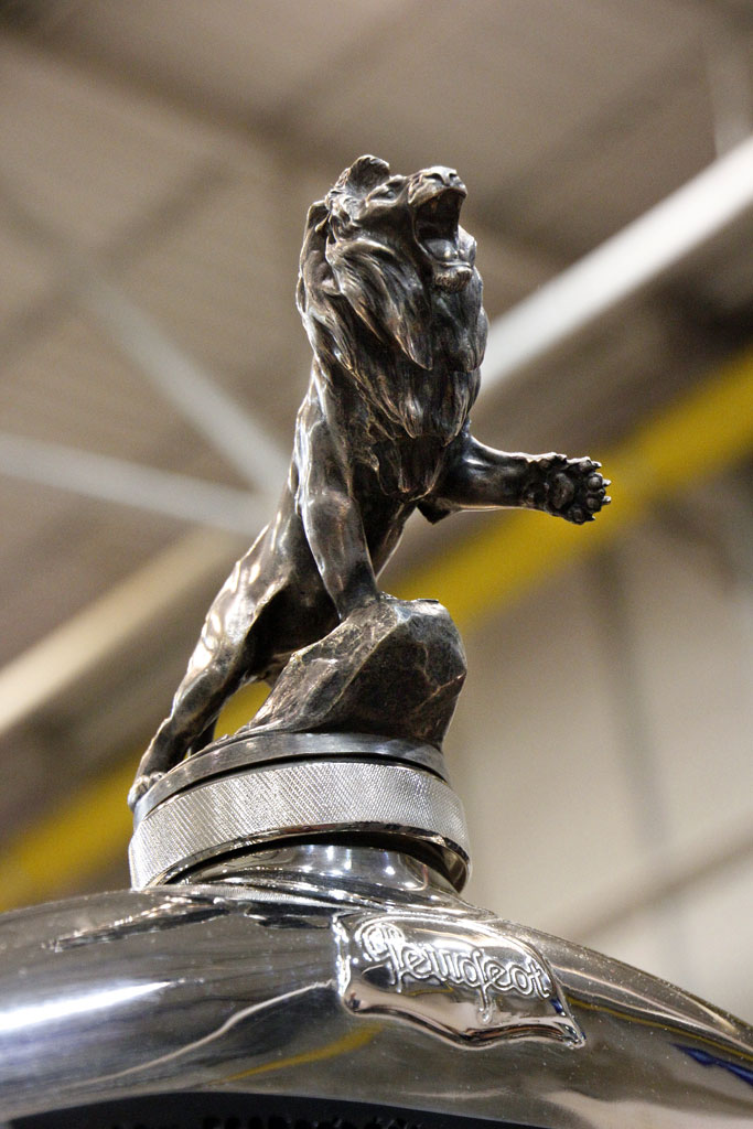 1928-29 Peugeot Typ 184_IMG_2827